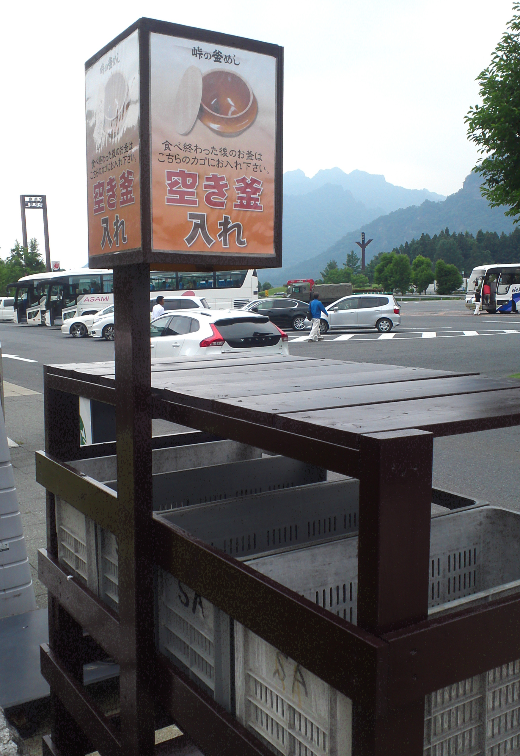 横川SA上り線（藤岡方面）内に設置されている釜飯空容器の回収箱。